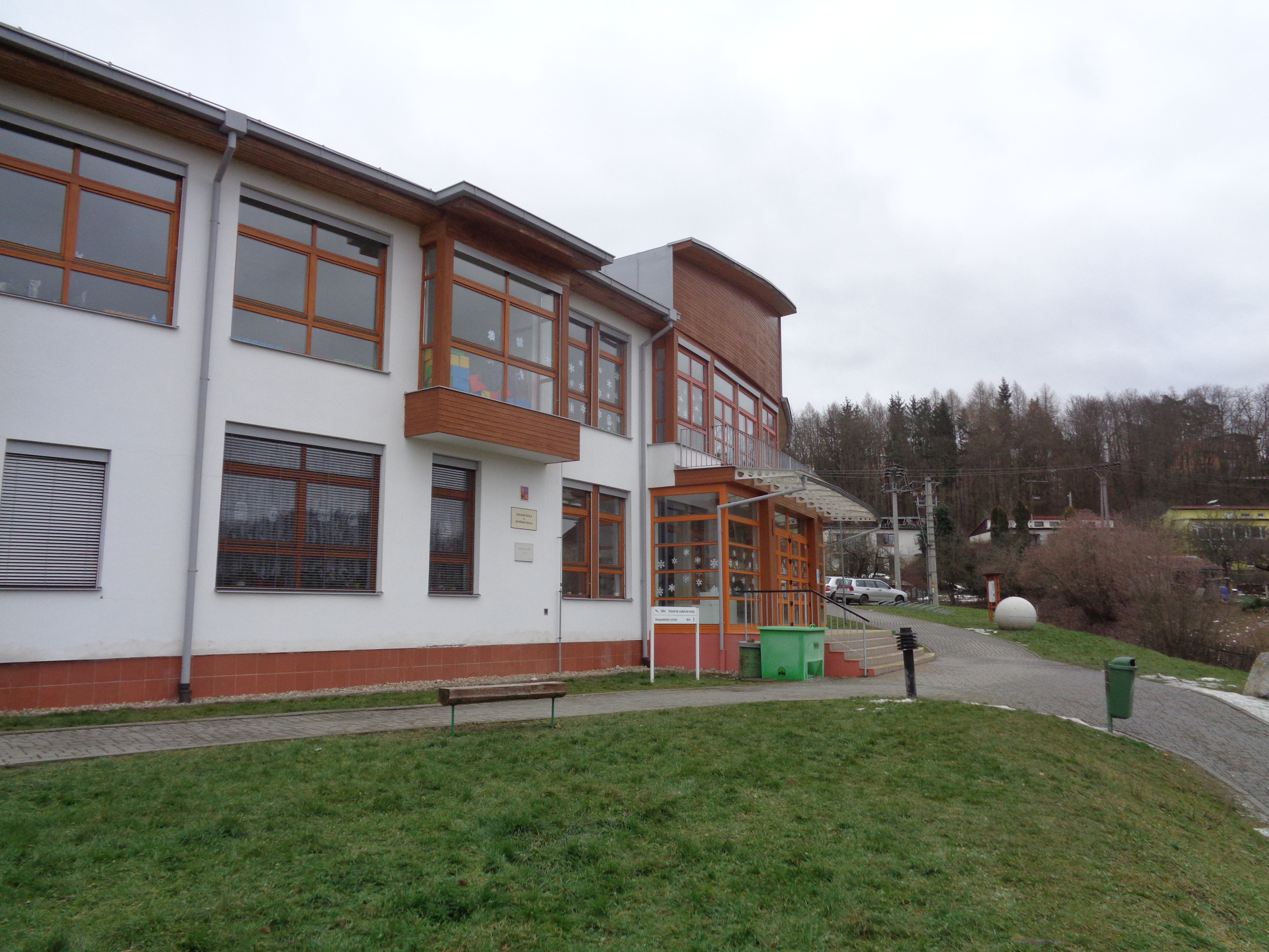 Základní a Mateřská škola ve Křtinách